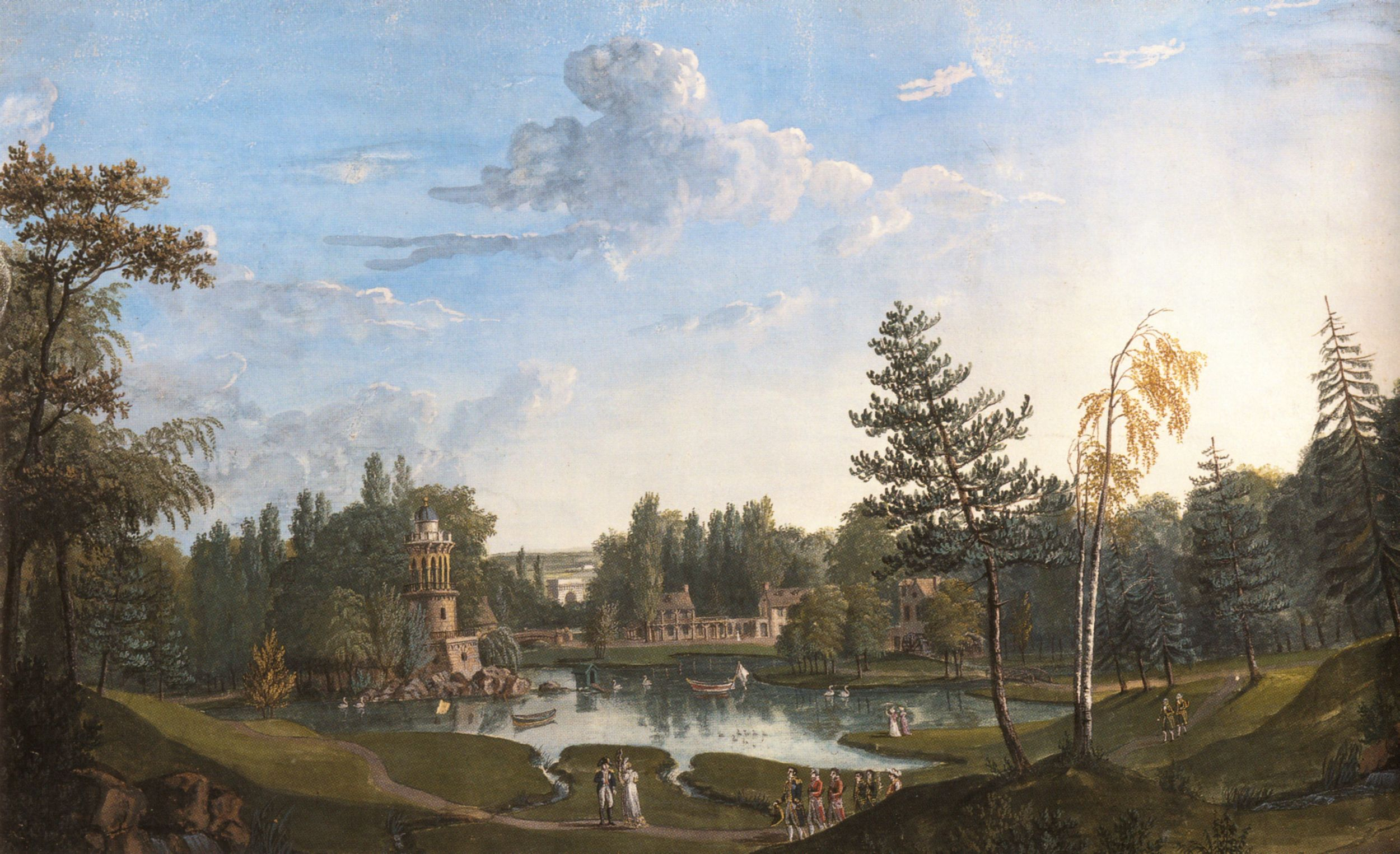 La promenade de Napoléon au Hameau, gouache attribuée à Louis Gadbois. Évocation de la « fête de l'Impératrice » donnée le 25 août 1811 dans les jardins du petit Trianon. On aperçoit Napoléon Ier et son épouse Marie-Louise d'Autriche au premier plan.